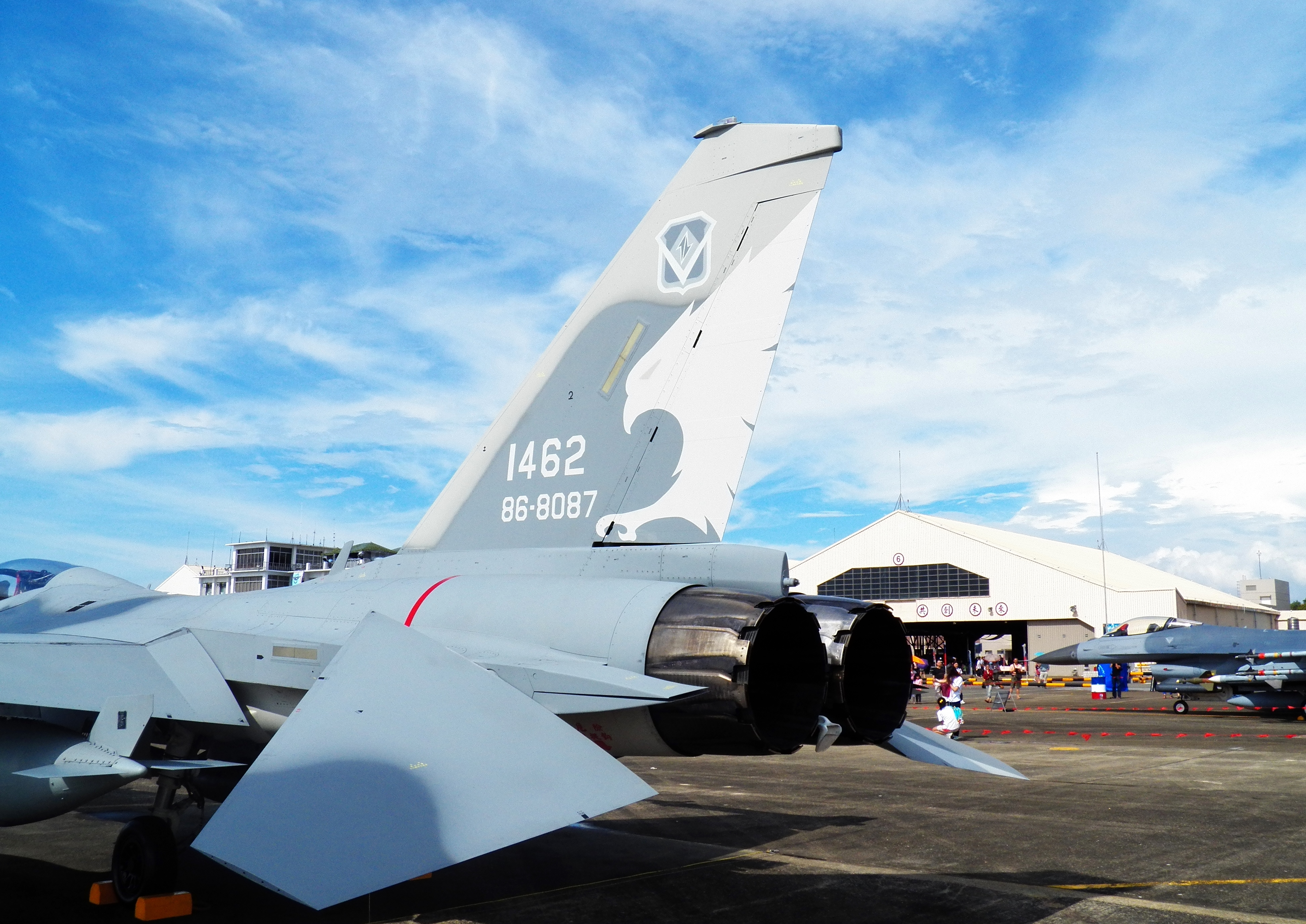 455聯隊F-CK-1A 1462垂直尾翼左後方特寫，攝於2012年空軍嘉義基地營區開放活動。